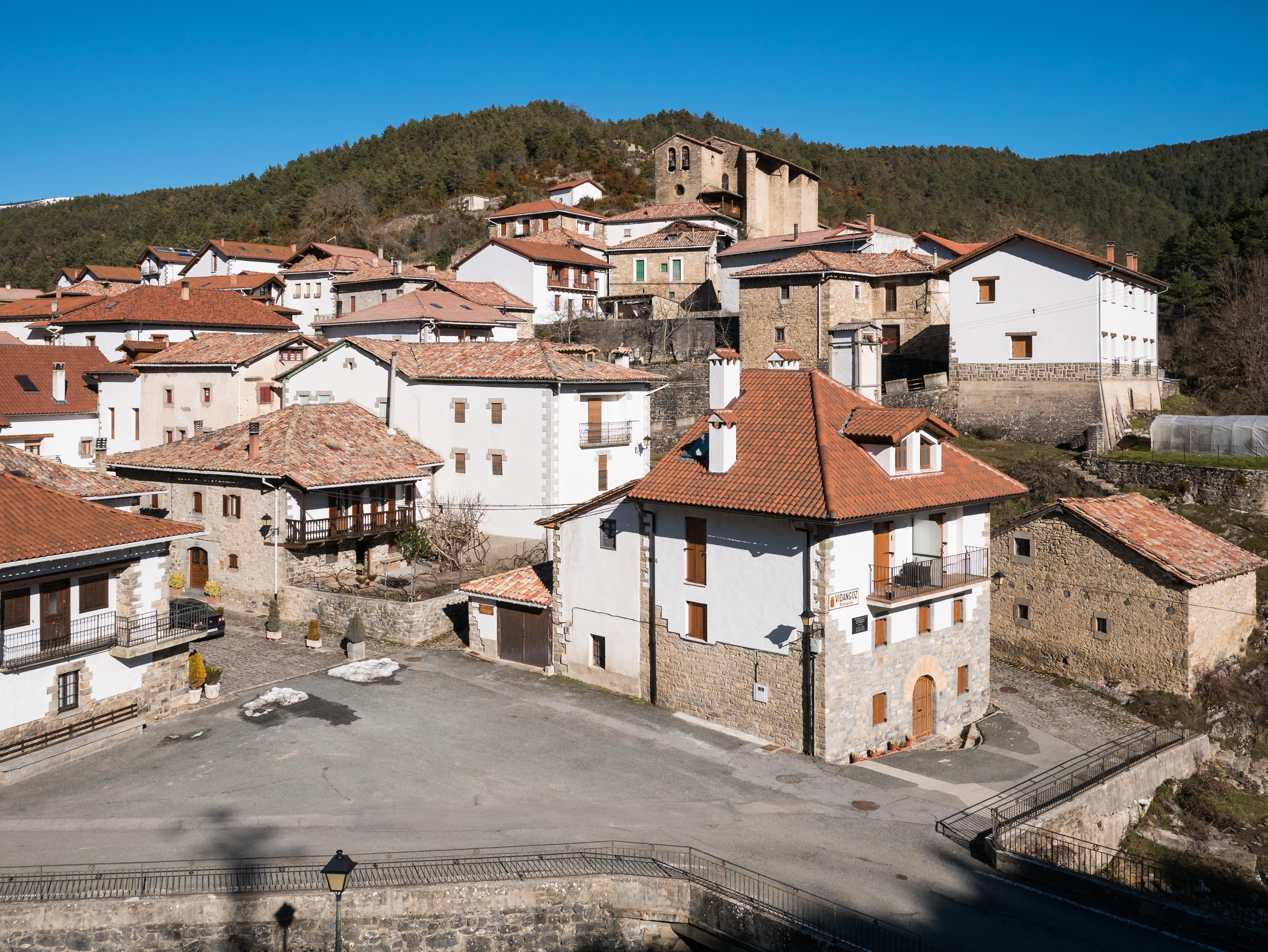 Vista de Vidángoz, Navarra, España